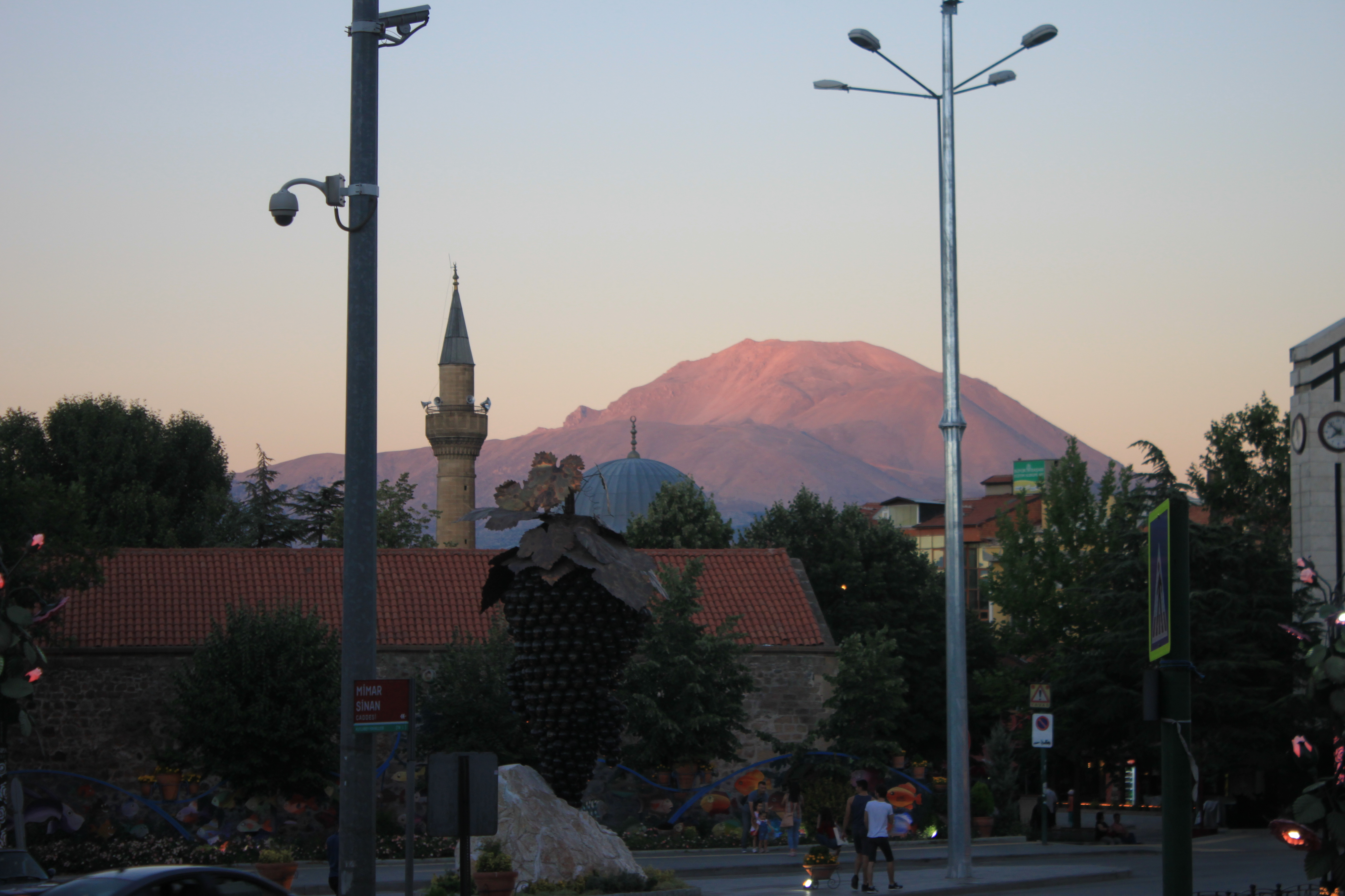 Blick von der Kutlu-Bey-Moschee nach Westen zum Davraz-Berg.